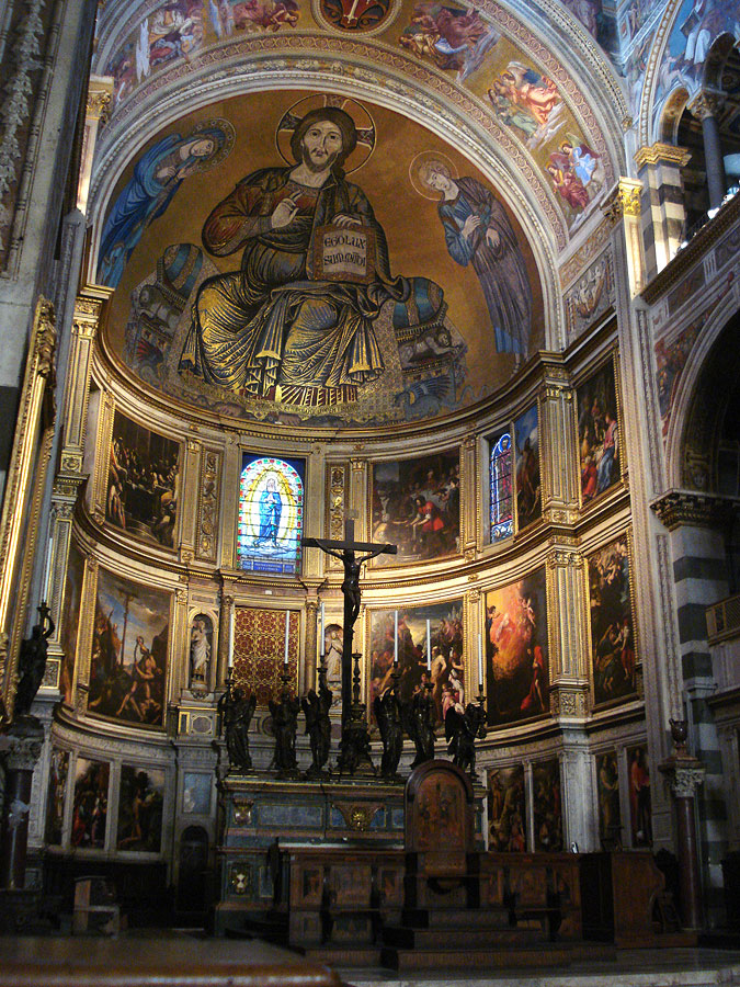 Interior da Catedral de Pisa